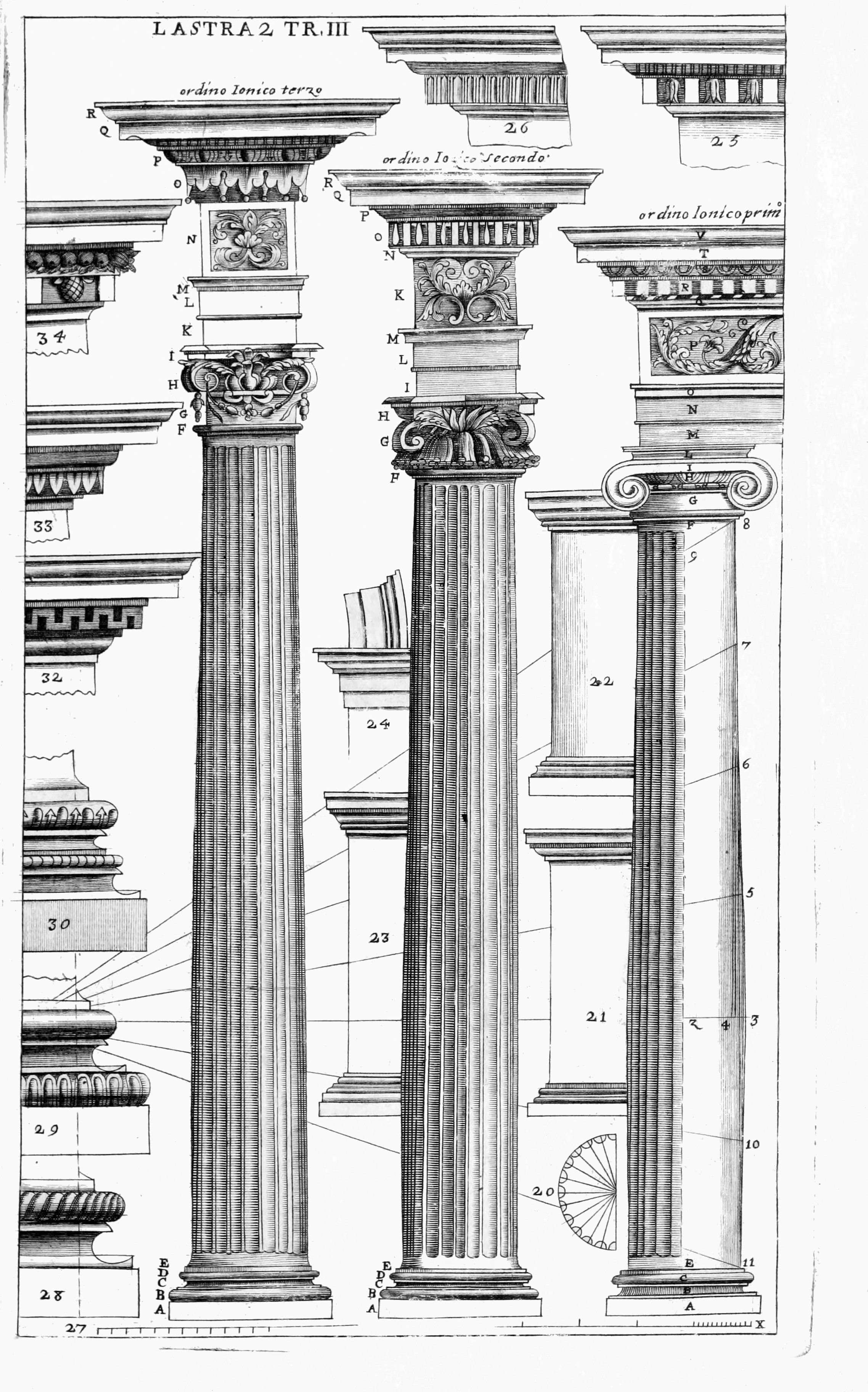 Lastra 2